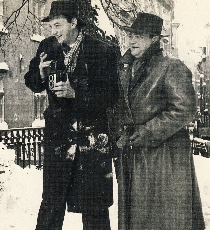 Författaren Stig Trenter (höger) med sin romanfigur Harry Friberg (Fotografen K W Gullers)